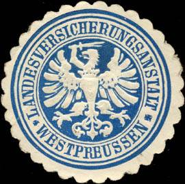 Sealing stamp Title: Landesversicherungsanstalt Westpreussen Description: blau, weiß, geprägt Place: Danzig size: 4 cm